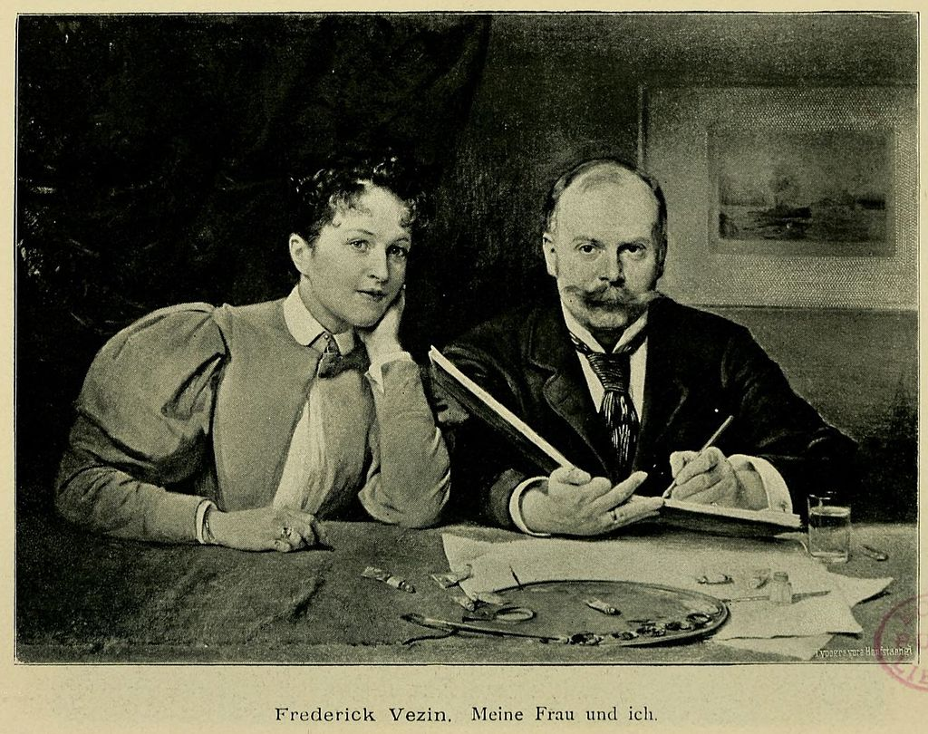 Ida und Frederick Vezin